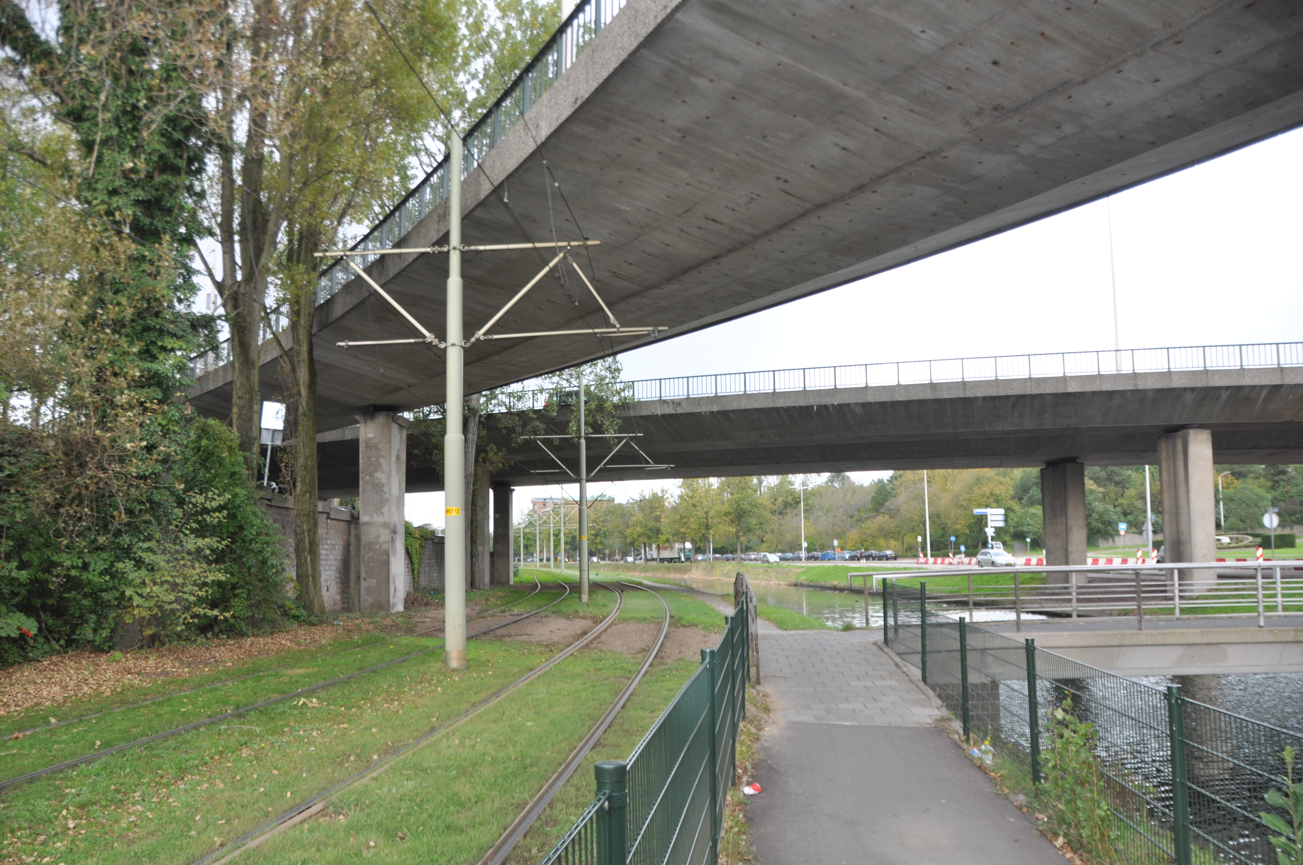 Bruggen in Den Haag.